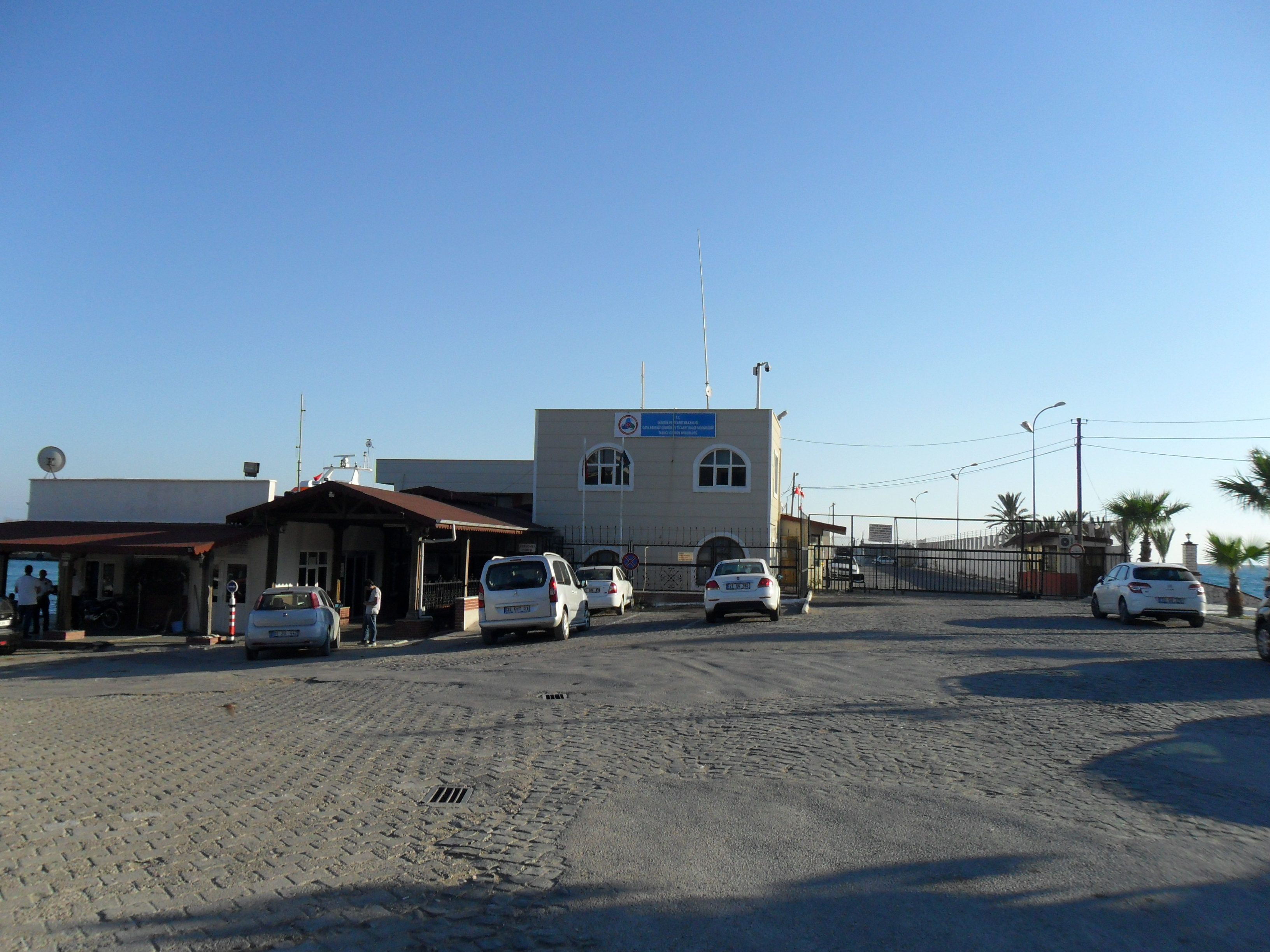 Taşucu belde merkezinde yer alan liman.